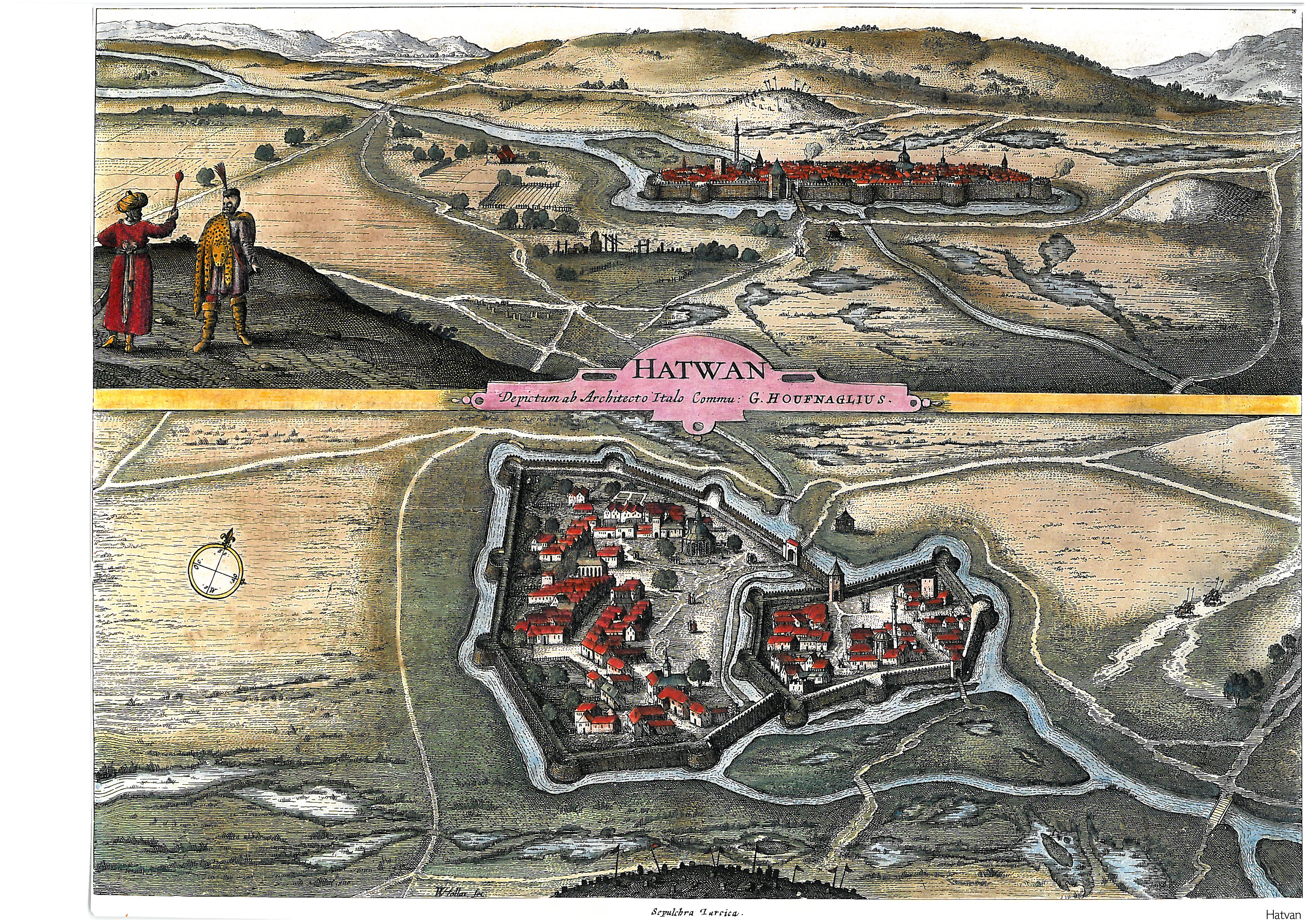 Hatvan látképe a XVI. század végén